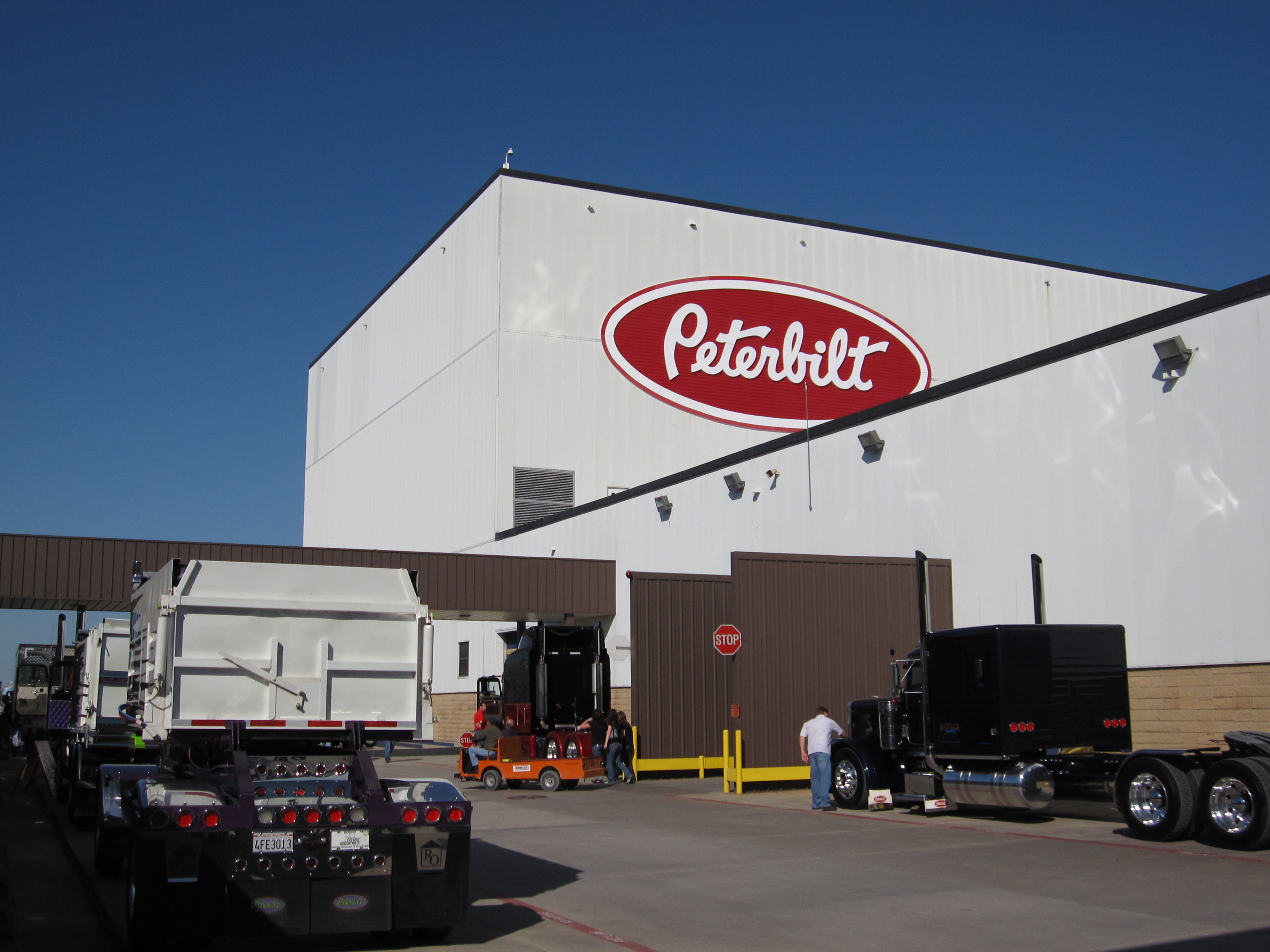 Peterbilt truck